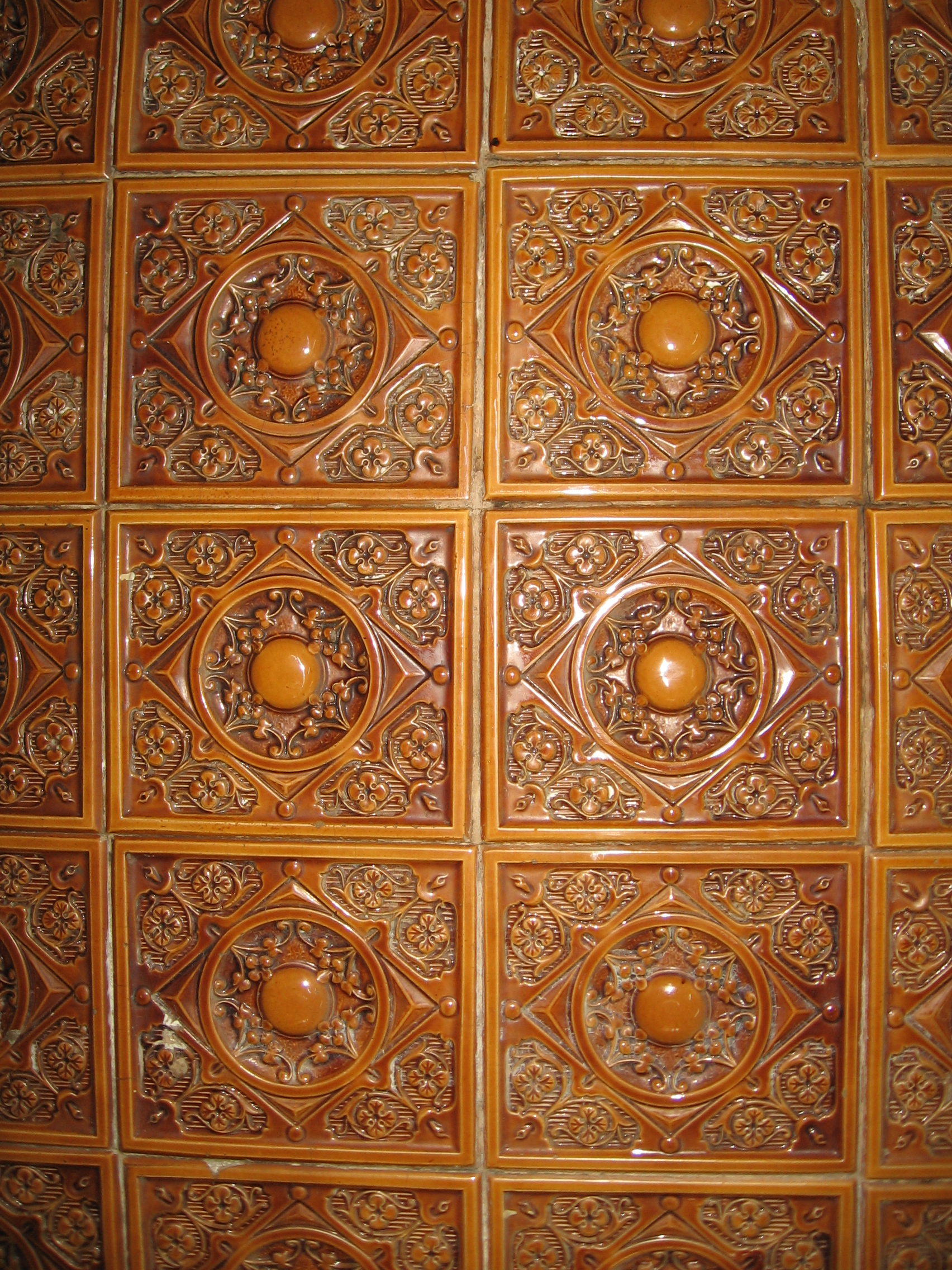 Беларуская (тарашкевіца): Былая сядзіба Трамбіцкіх (Інтэрнацыянальны). Кафля на печы. This is a photo of Belarusian heritage monument. Reference number: 113Г000610 ( WLM)